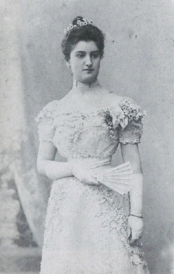 Княгиня Анна Владимировна Щербатова (1879—1942), урождённая княжна Барятинская